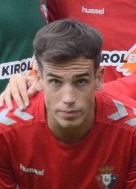 CSC_0149